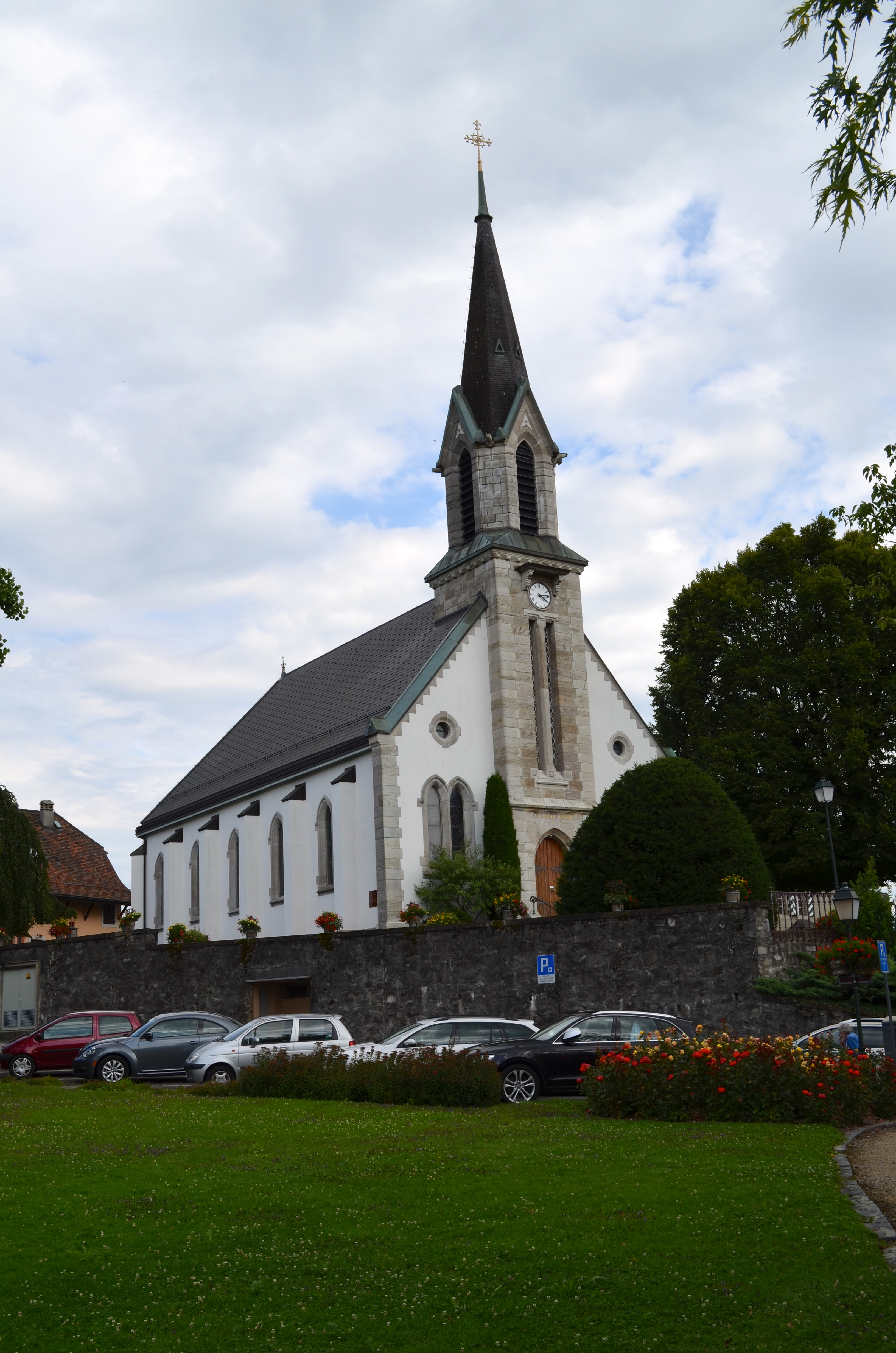 Église de Chexbres (Vaud-Suisse)